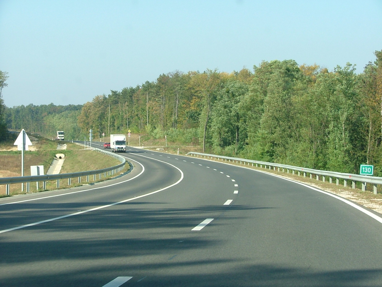 B8 Hauptstraße bei Csehimindszent